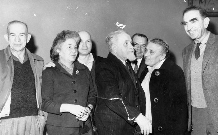 יצחק גרינבוים-מנהיג יהודי פולין ונציגם בפרלמנט הפולני לפני מלחמת העולם השנייה, ושר הפנים הראשון בממשלה הזמנית של ישראל בשנת 1948-9. בשנותיו האחרונות התגורר בקבוץ גן-שמואל לצידו של בנו-חבר הקבוץ והמחנך בניו (בנימין) גרינבוים